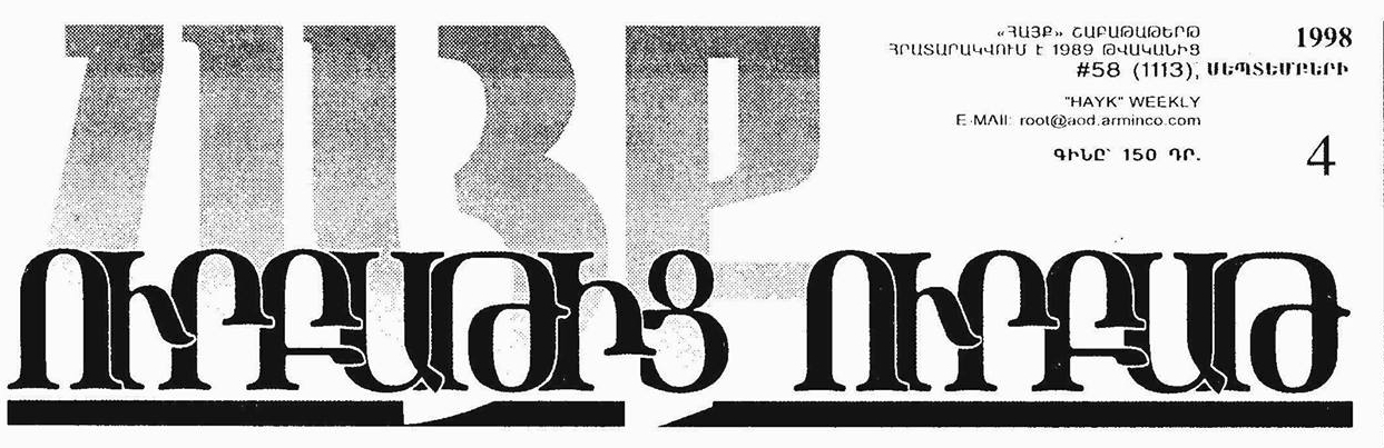 Հայք թերթի վերնամաս